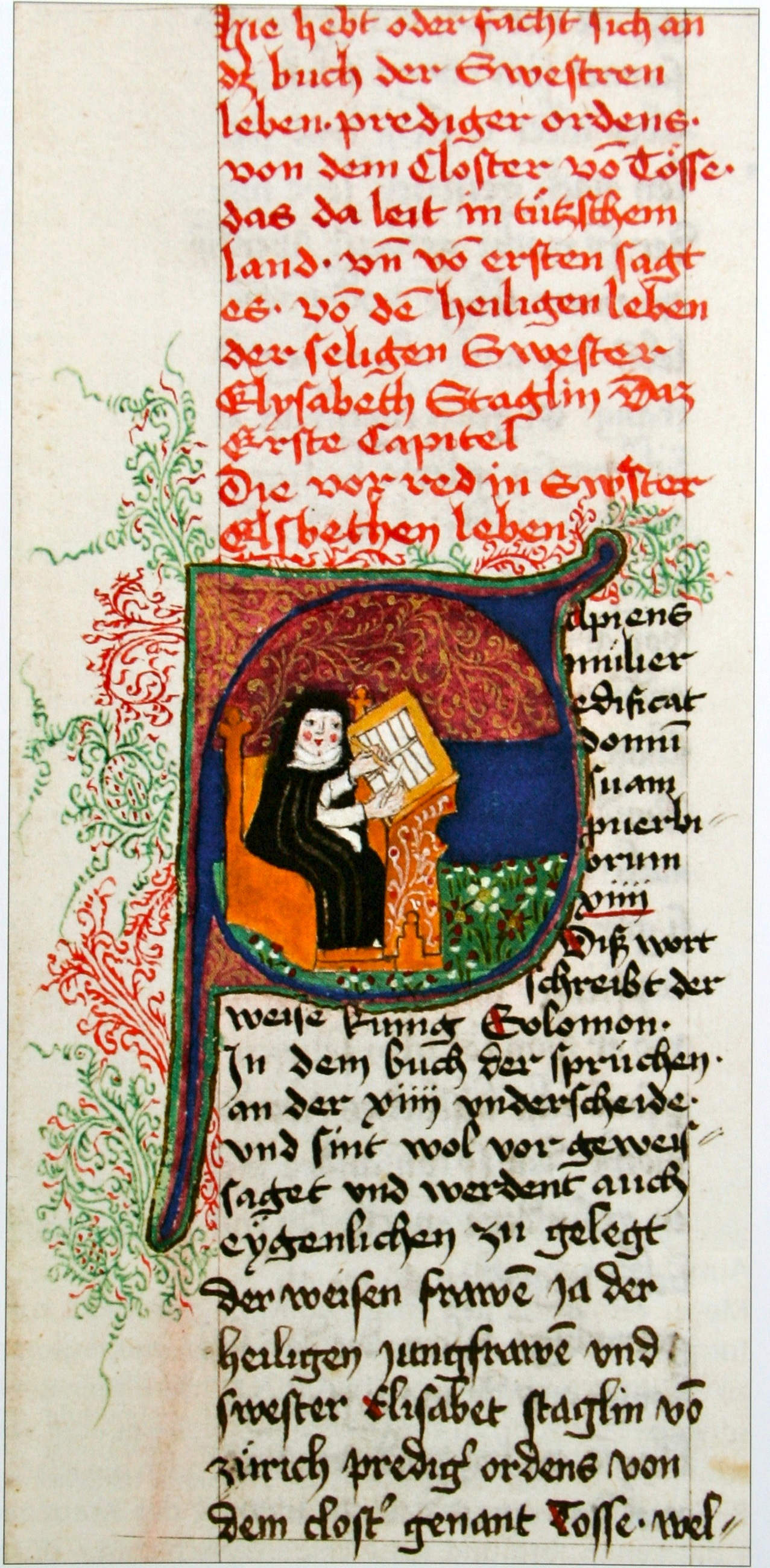 Kloster Töss Elsbeth Stagel; Ausschnitt aus dem Tösser Schwesternbuch: Initiale "S"(apiens) mit dem Schreiberinnenbild der Nonne Elsbeth Stagel am Schreibpult mit Feder und Federmesser; Handschrift der Stadtbibliothek Nürnberg, Cod. cent. V, 10a, 2.3ra